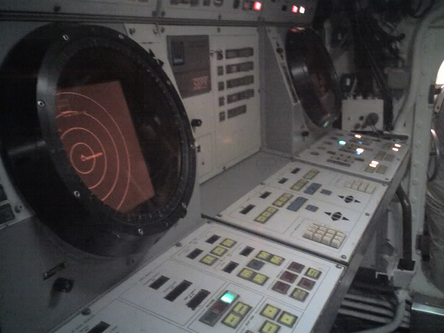 sottomarino enrico toti - museo della scienza e della tecnica - milano - pannello controllo per siluri filoguidati